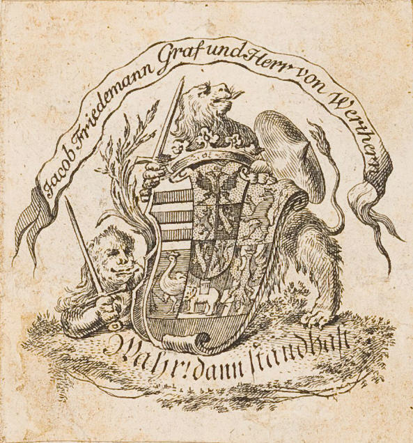 Das Wappen des Grafen Jacob Friedemann von Werthern in seinem Exlibris